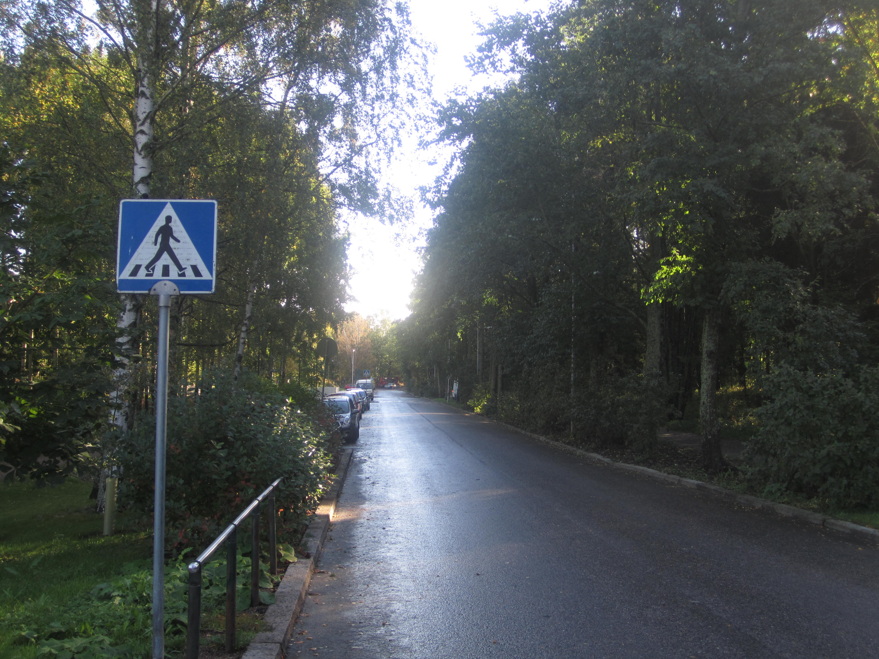 Ratsastie Helsingin Ruskeasuolla. Tie, jolla kuvattiin Hurriganes-yhtyeen Roadrunner-albumin kansikuva.